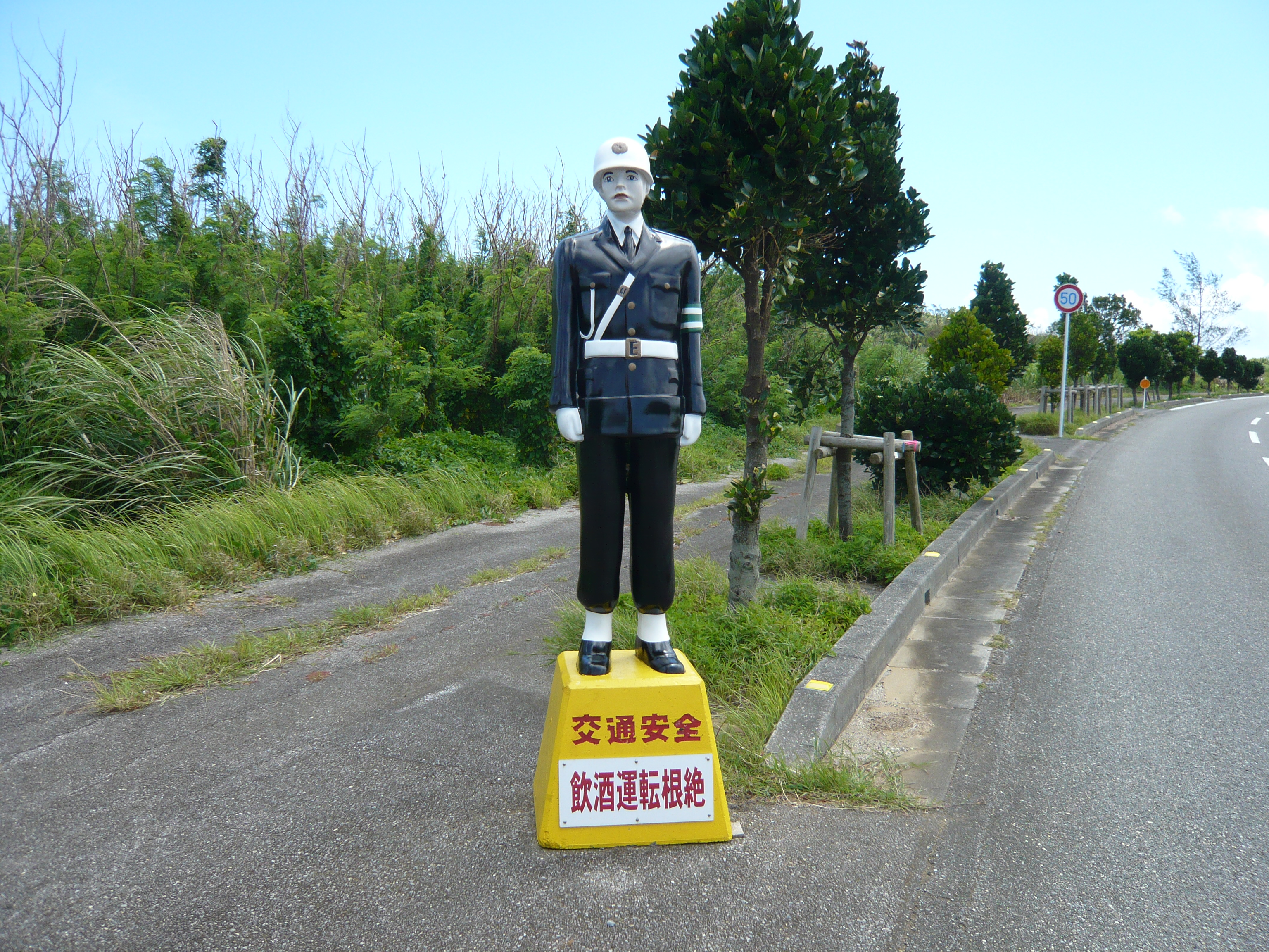 宮古まもる君。宮古島市中部、旧平良市高野の県道83号線にて撮影。